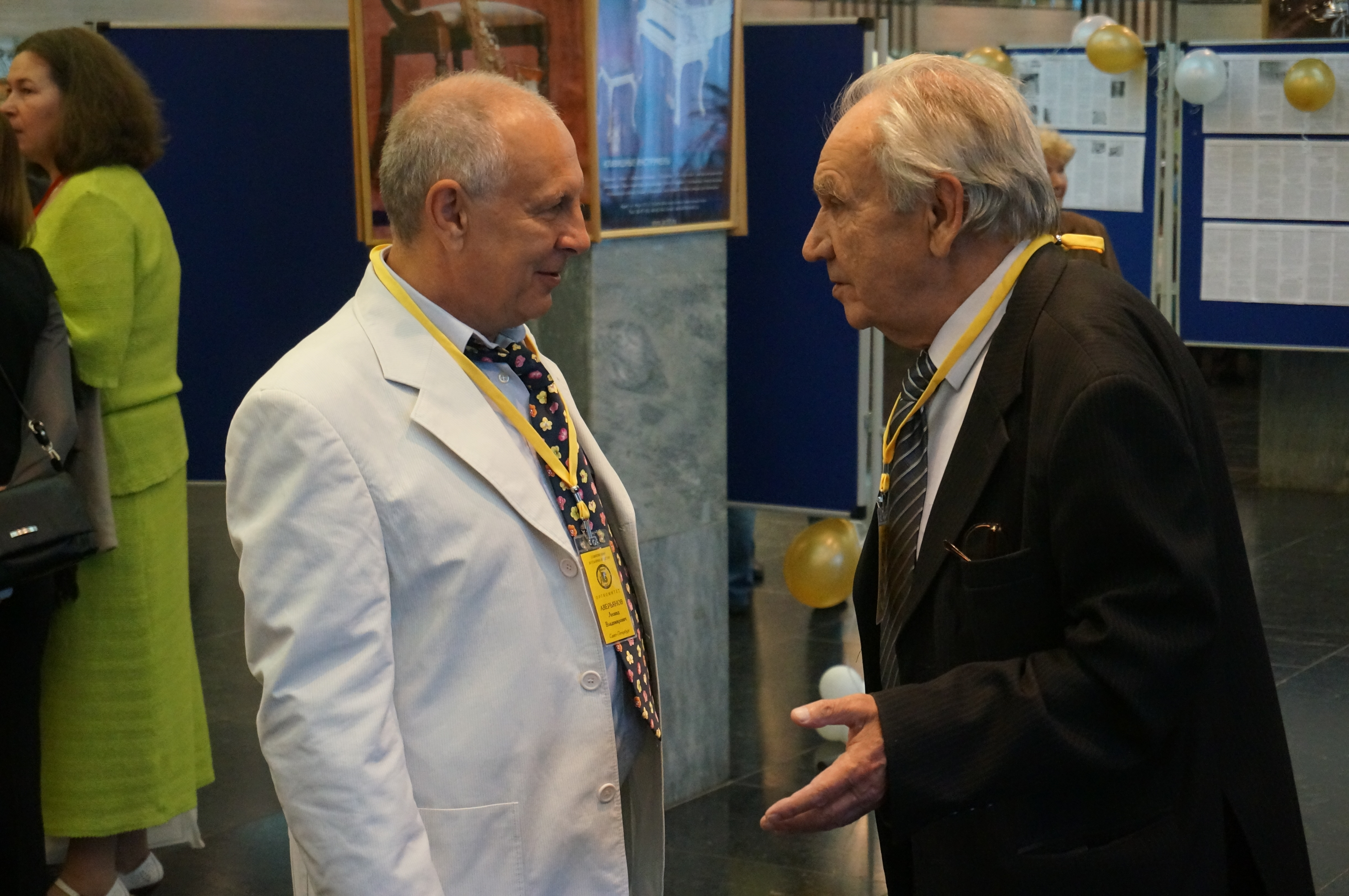 Леонид Владимирович Аверьянов (слева) и Василевич Владислав Иванович. XIII съезд Русского ботанического общества. Тольятти, 2013 год.